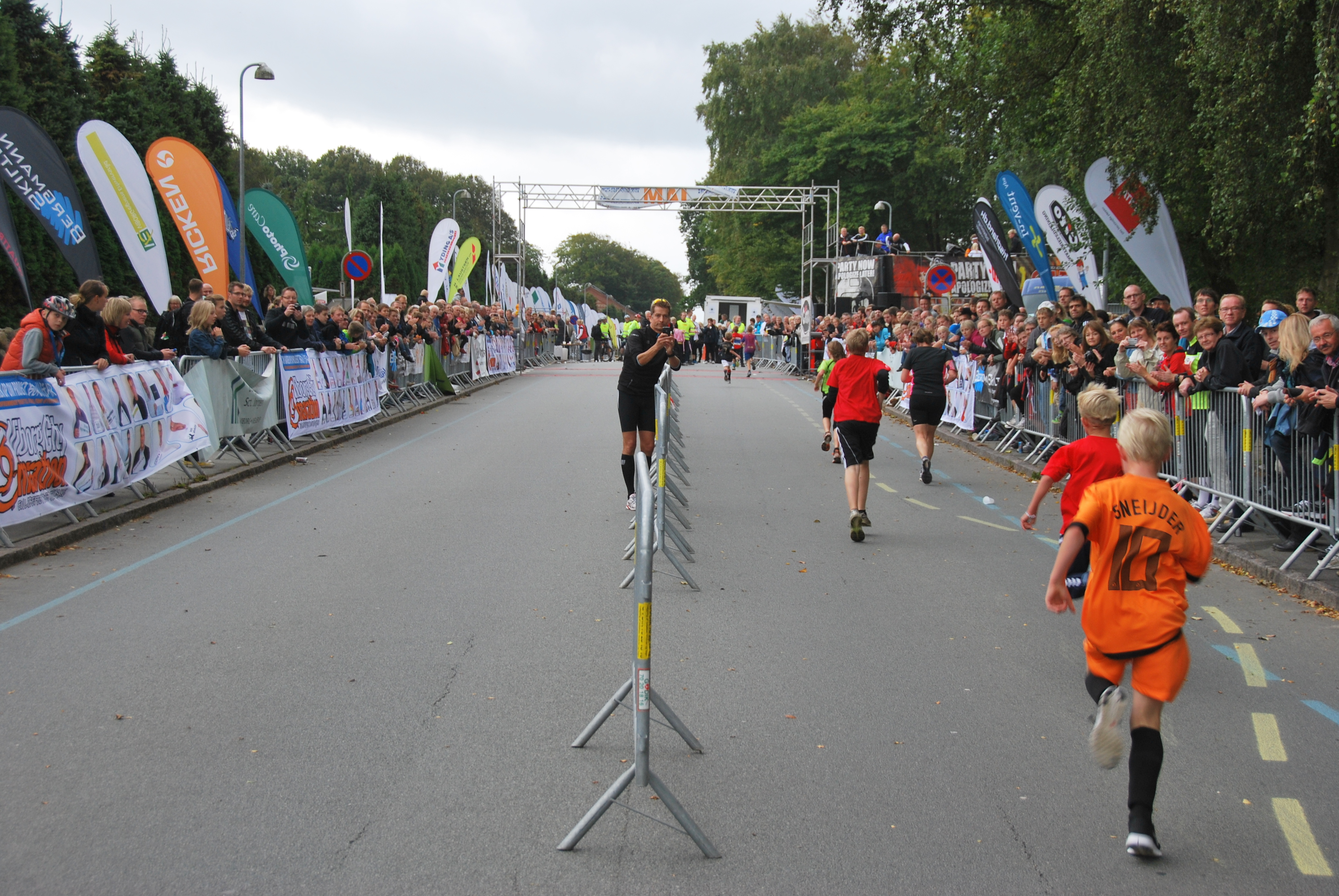 Opløbsstrækningen på Rødevej ved Viborg City Marathon 2012.